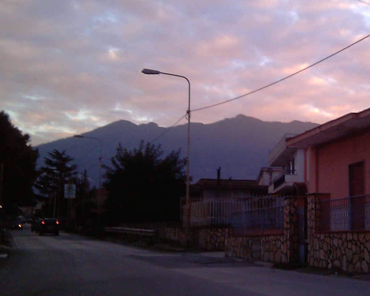 Il monte Somma visto da Somma Vesuviana